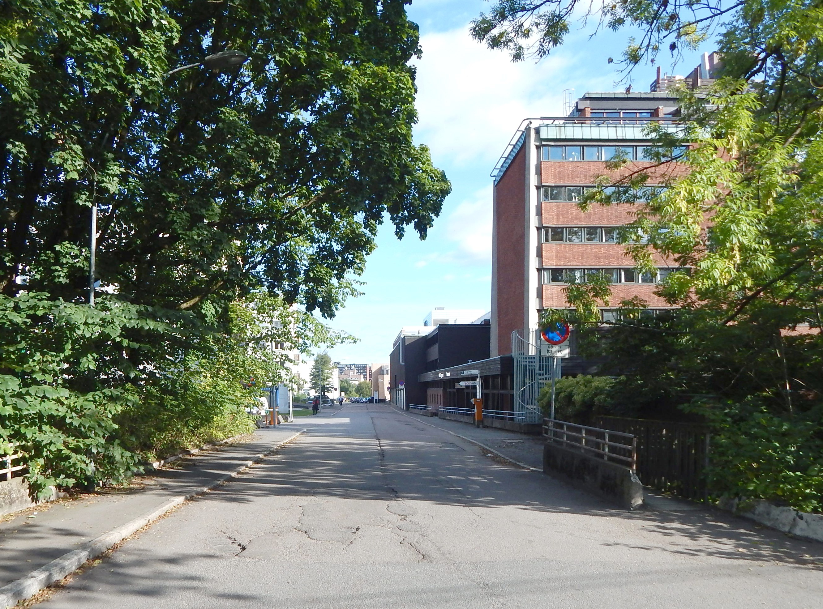 Børrestuveien vestfra